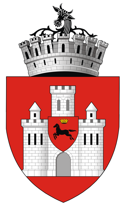 Iaşi.